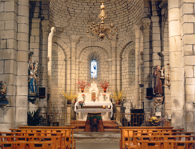 Intérieur de l'église de Baraigne (Aude-France)